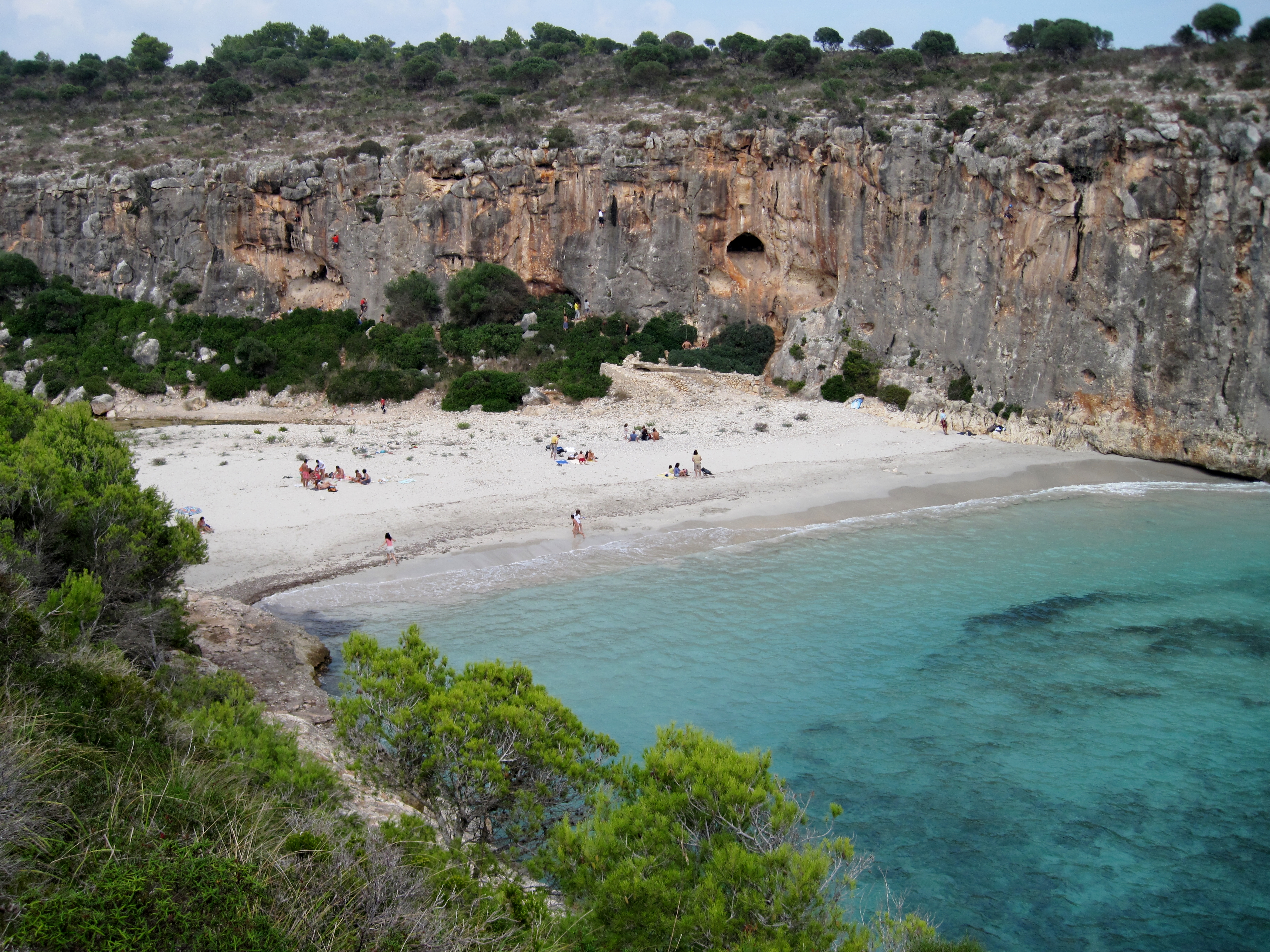 Cala Magraner, Bucht an der Küste der Gemeinde Manacor, Mallorca, Spanien